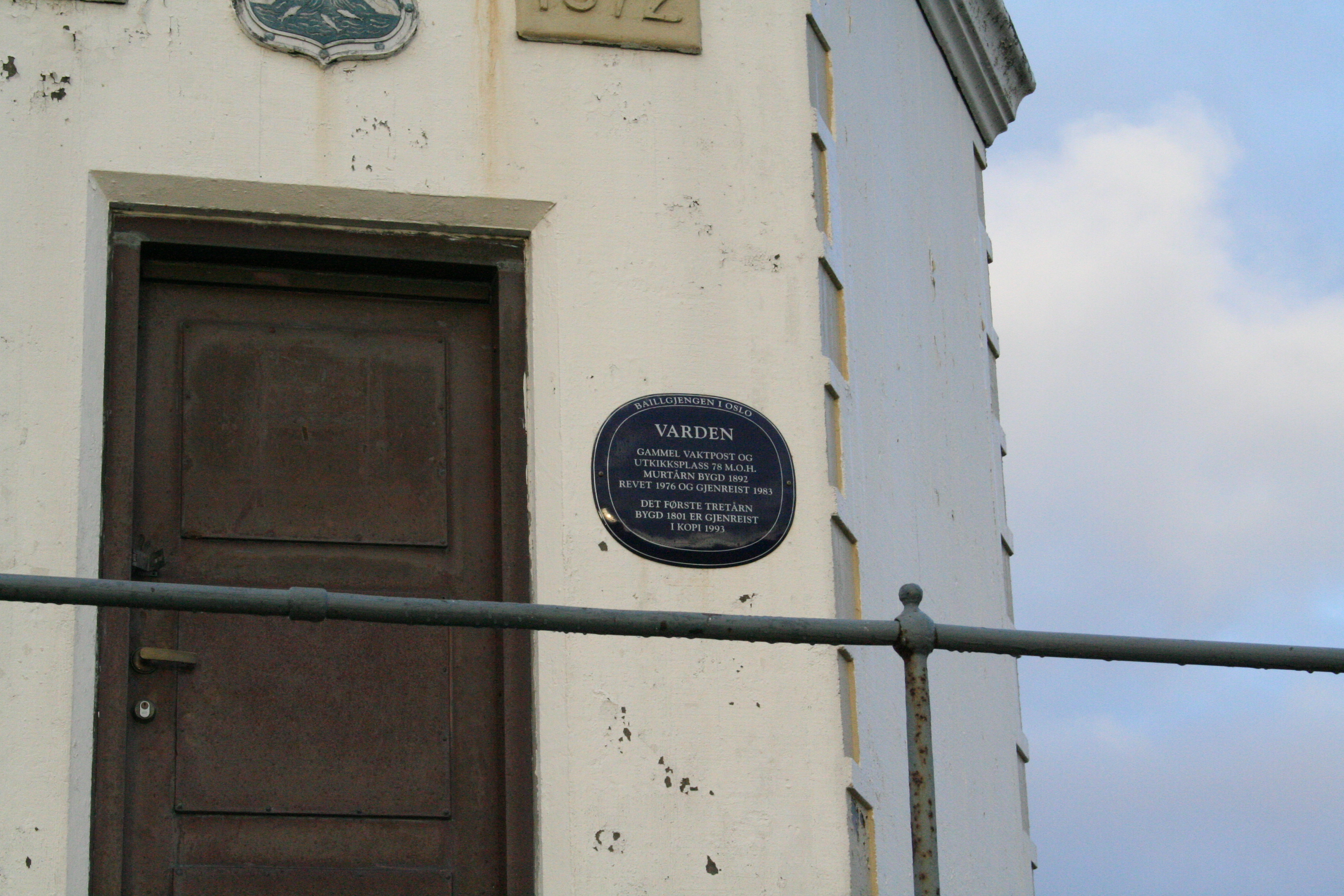 Dørskilt og inngangsparti på Varden i Kristiansund